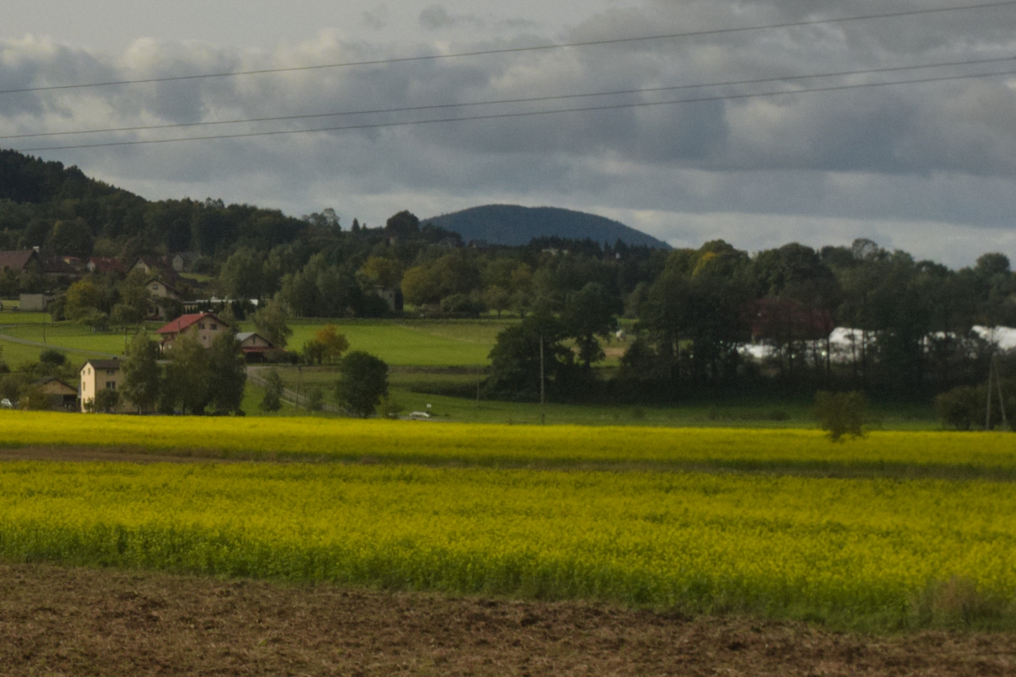 wzgórze Chełm (464 m n.p.m.), po lewej zbocze Żaru (688 m), u podnóża zabudowania Górek Małych, widok z Górek Małych, z ul. Breńskiej, z okna autobusu